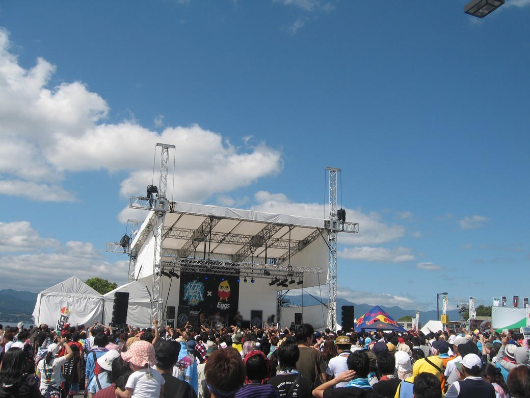 イナズマロックフェス フリー（無料）エリア風景